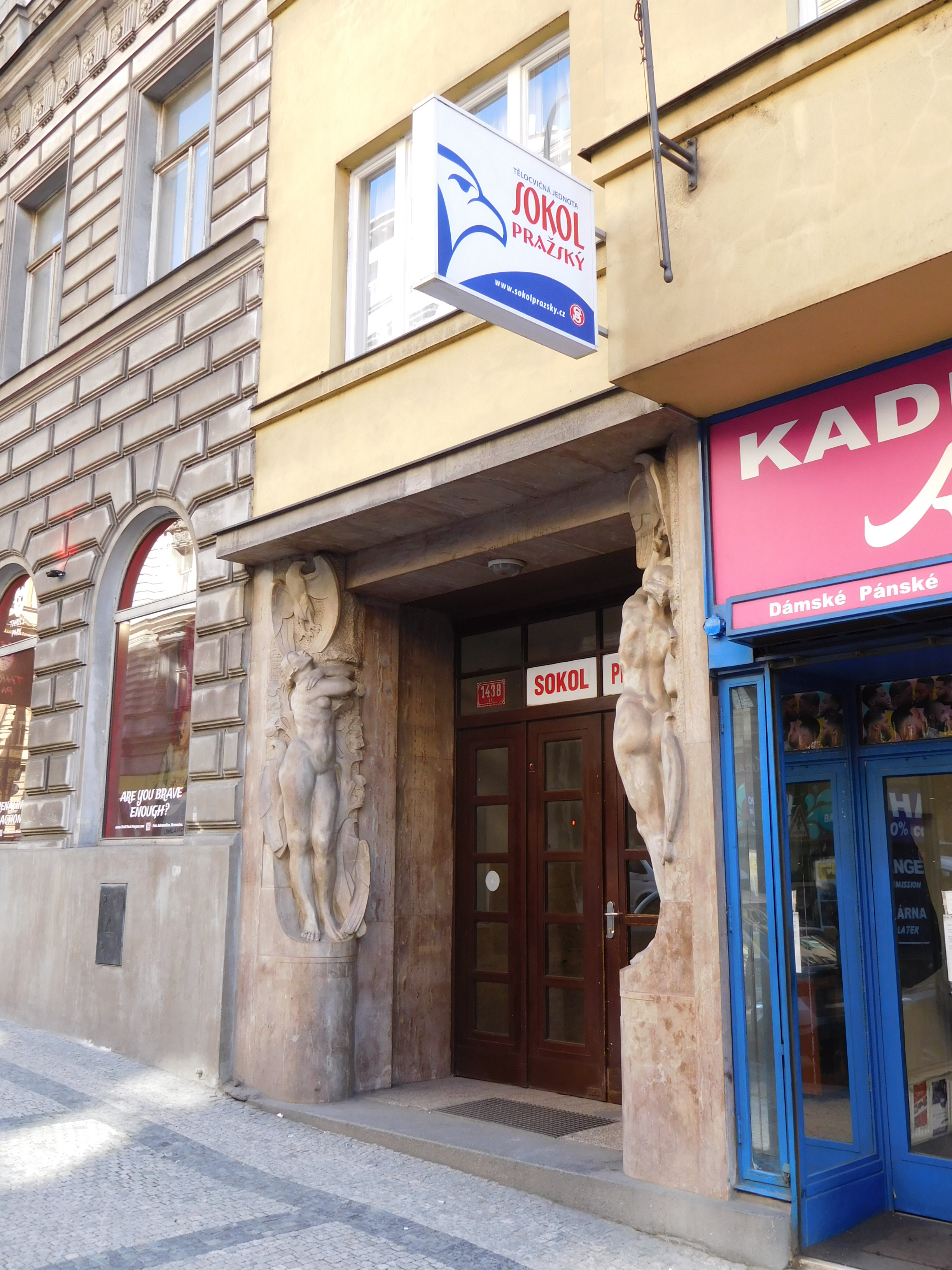 Praha - Nové Město, Žitná 42 - Sokol Pražský